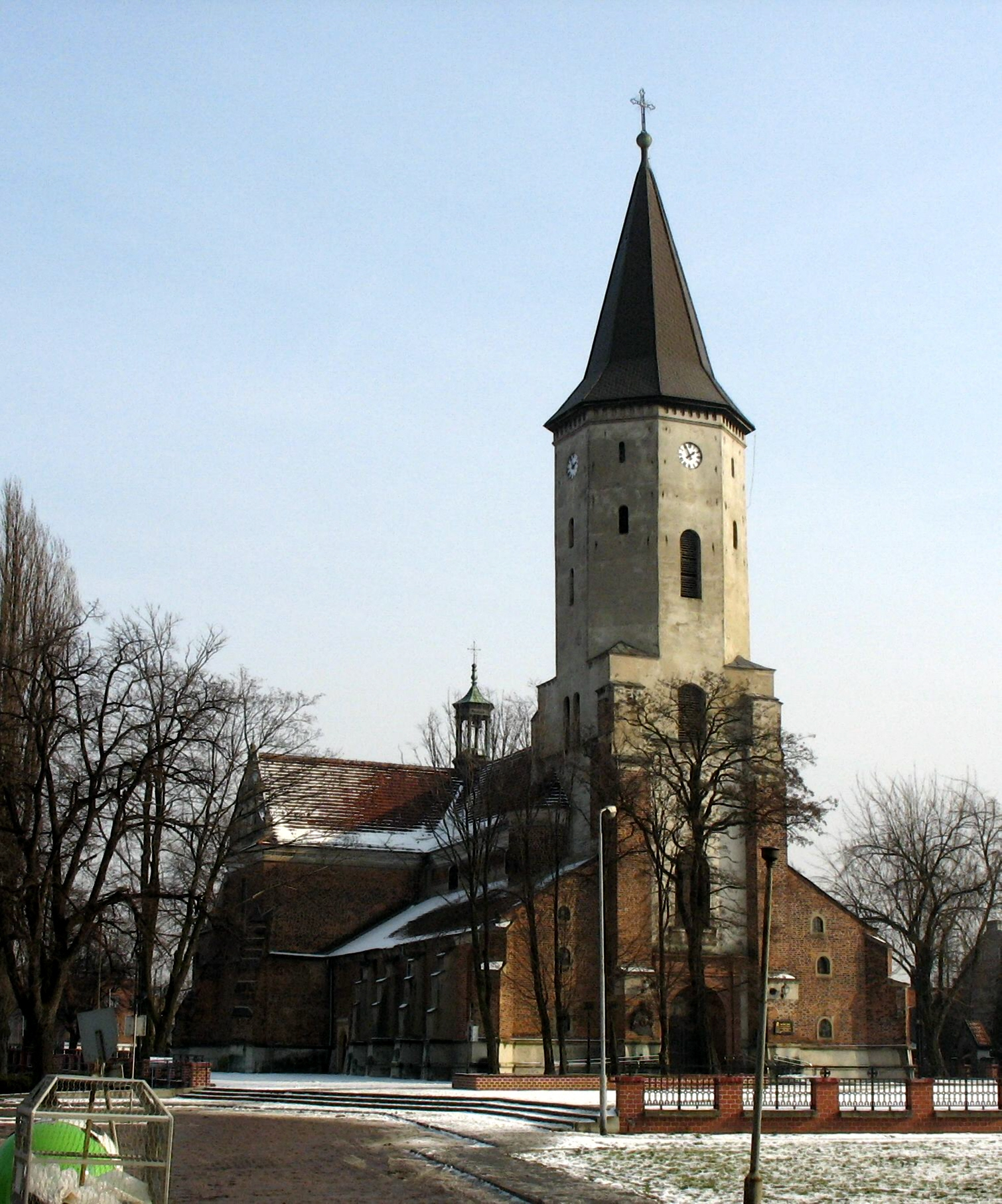 Kościół św. Mateusza